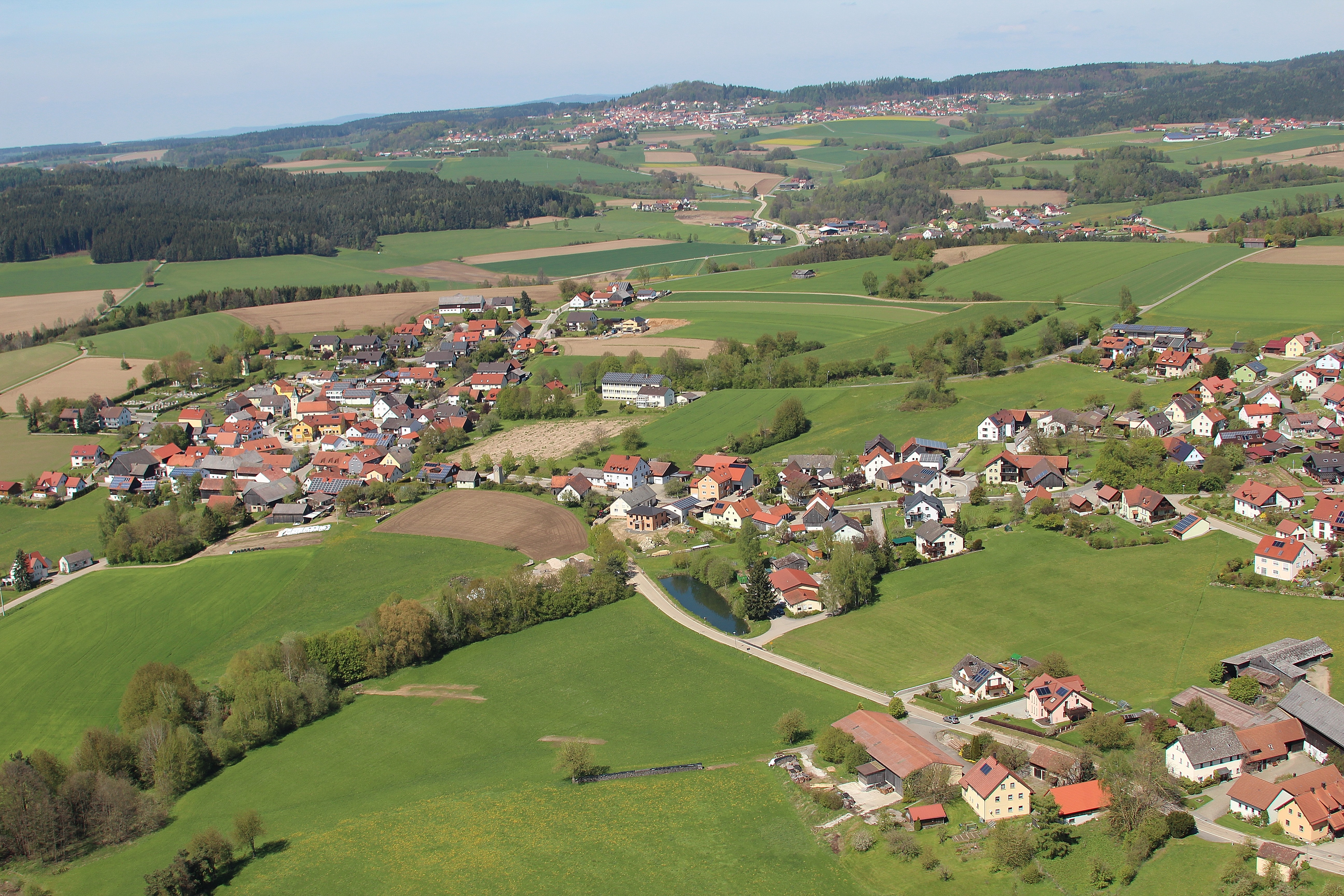 Gleiritsch mit Steinach (rechter, unterer Bildrand), Bildmitte Lampenricht, Pilchau (rechter Bildrand, oben), im Hintergrund Tännesberg (Landkreis Neustadt an der Waldnaab); Gemeinde Gleiritsch, Landkreis Schwandorf, Oberpfalz, Bayern